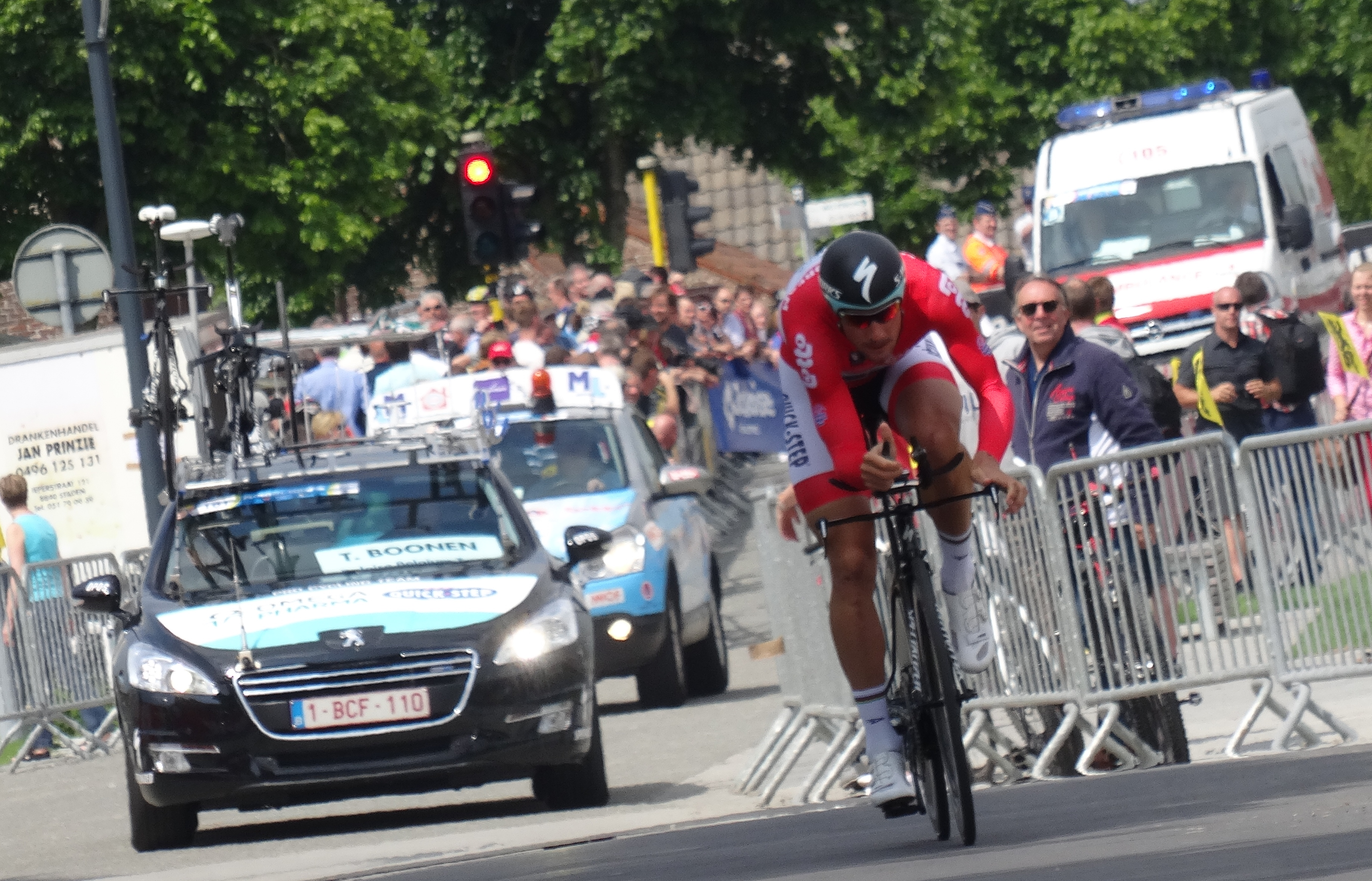 Reportage photographique réalisé le vendredi 30 mai à l'occasion du contre-la-montre individuel de la troisième étape du Tour de Belgique 2014 à Dixmude, Belgique.